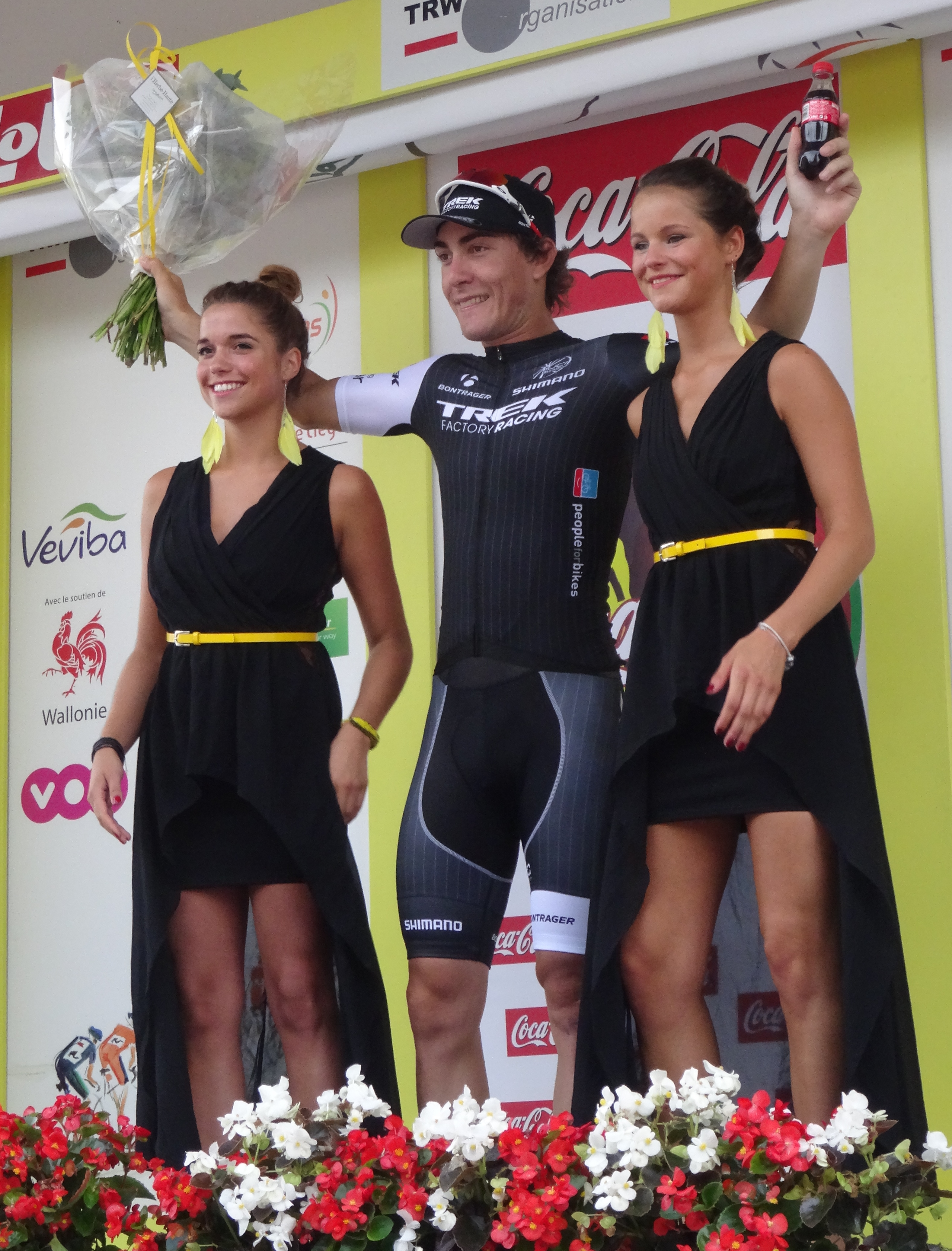 Reportage photographique réalisé le dimanche 27 juillet à l'occasion de l'arrivée de la deuxième étape du Tour de Wallonie 2014 à Perwez, Belgique.